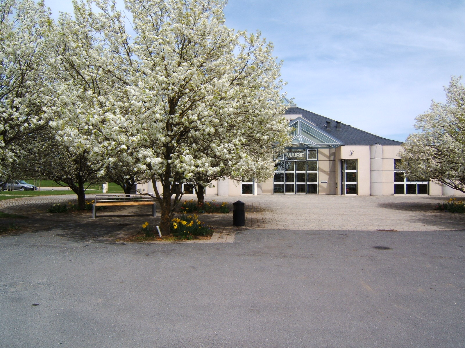 La Mairie d'Olemps